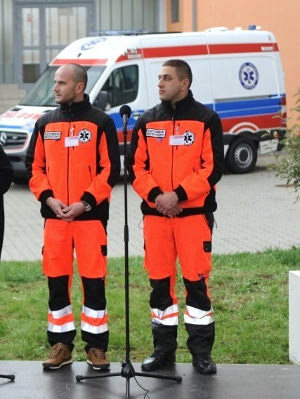 Ratownicy medyczni w Staszowie (woj. świętokrzyskie).